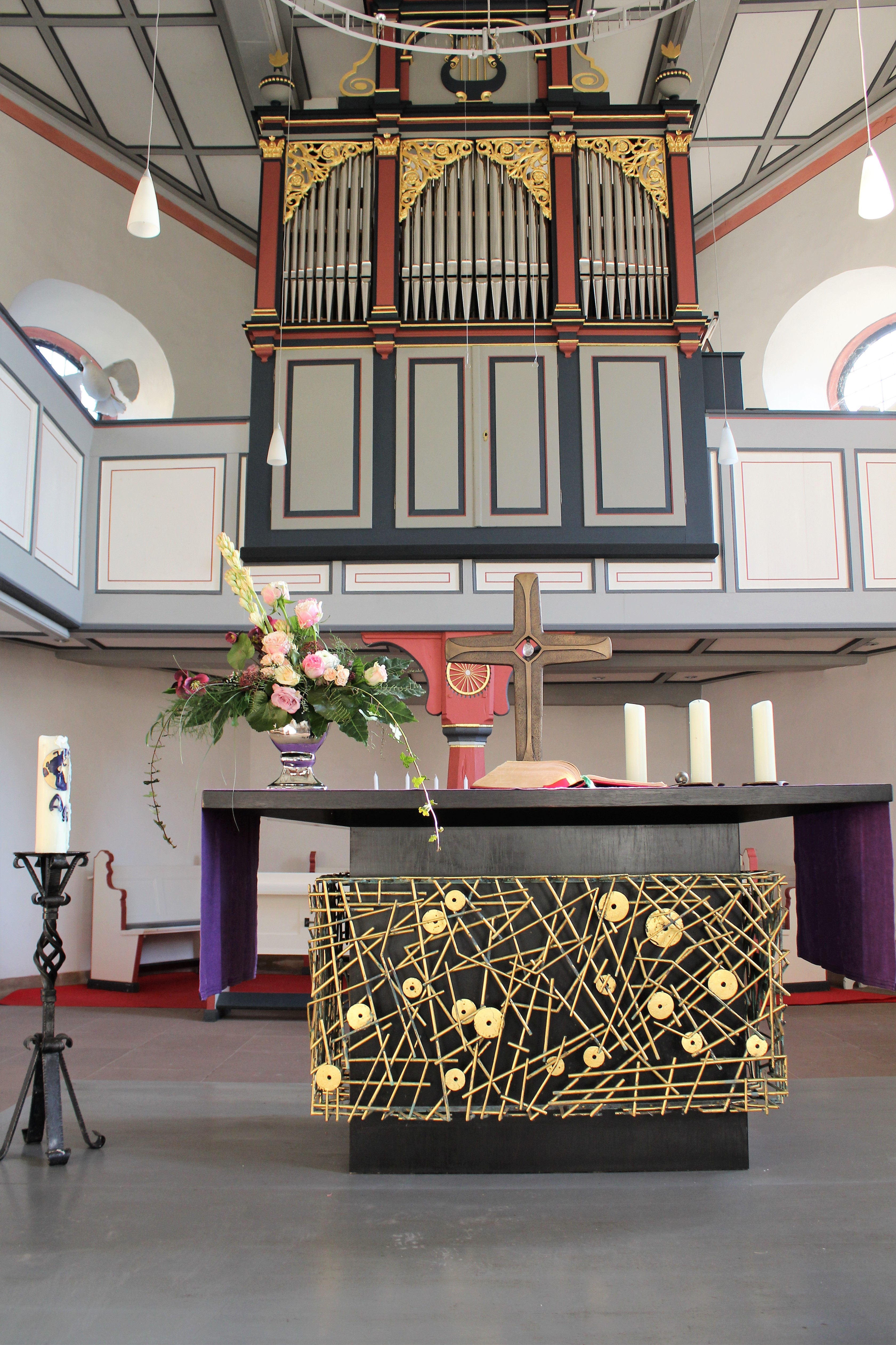 Orgel in der Evangelischen Kirche Eichen (Nidderau), Main-Kinzig-Kreis, Hessen, Deutschland